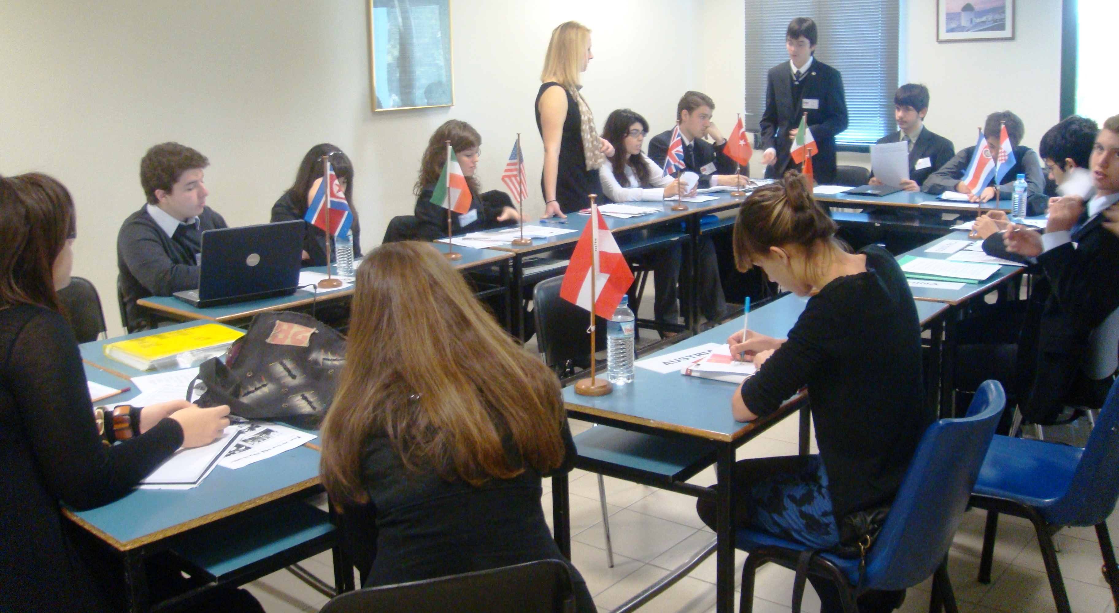 Φωτογραφία από την προσομοίωση του Συμβουλίου Ασφαλείας στο πλαίσιο του 8ου μαθητικού Μοντέλου Ηνωμένων Εθνών Θεσσαλονίκης.